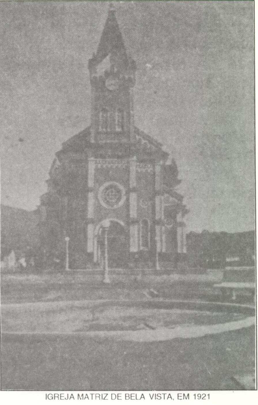 Igreja Matriz de São Sebastião da Bela Vista (1921)